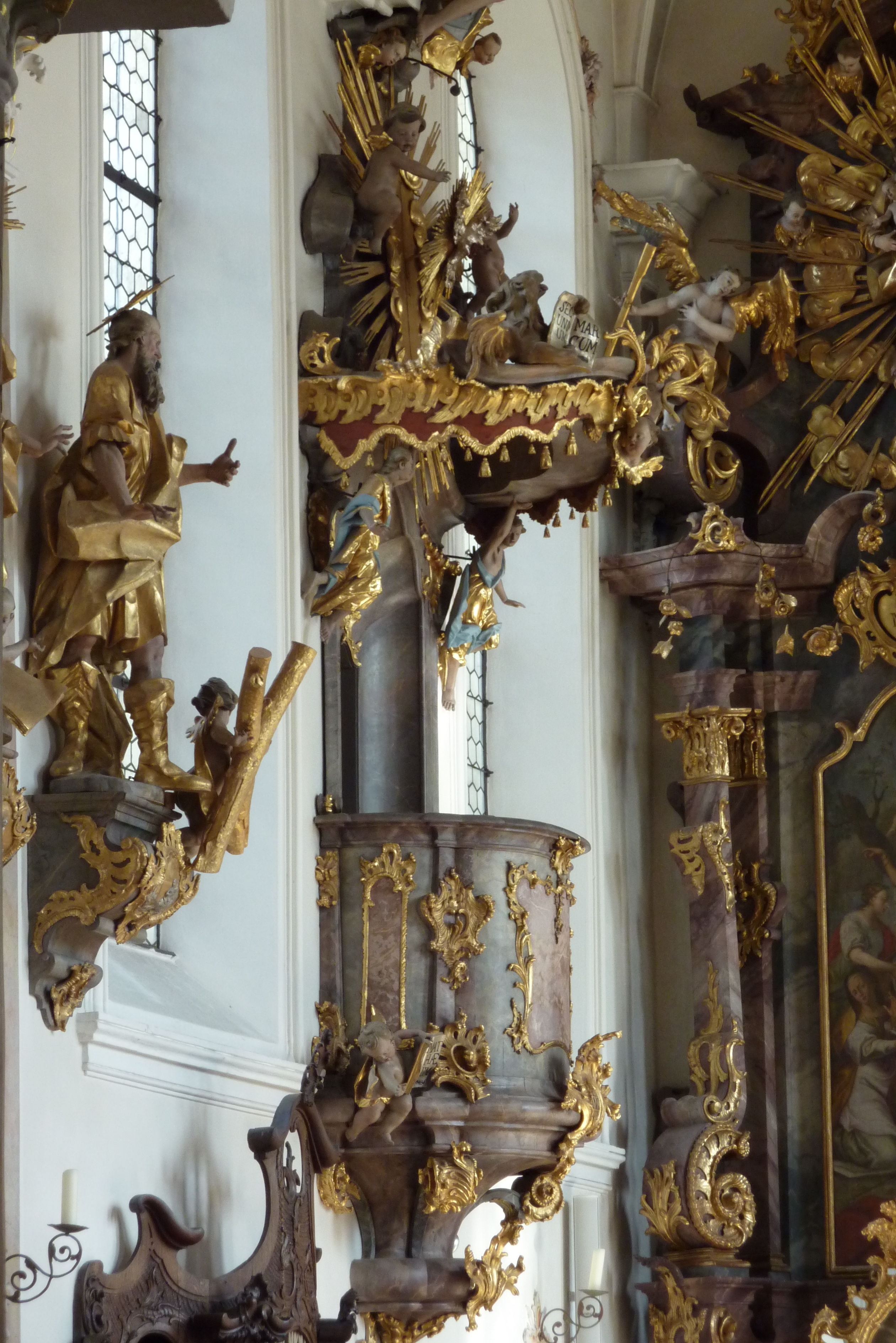 Katholische Pfarrkirche St. Vitus in Donaualtheim (Dillingen an der Donau), Kanzel von 1751/53